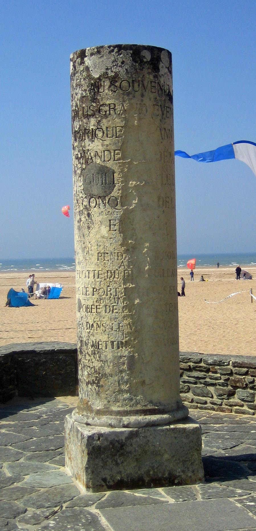 Colonne Guillaume le Conquérant à Houlgate (Calvados, Basse-Normandie, France), commémorant la conquête de l'Angleterre en 1066.